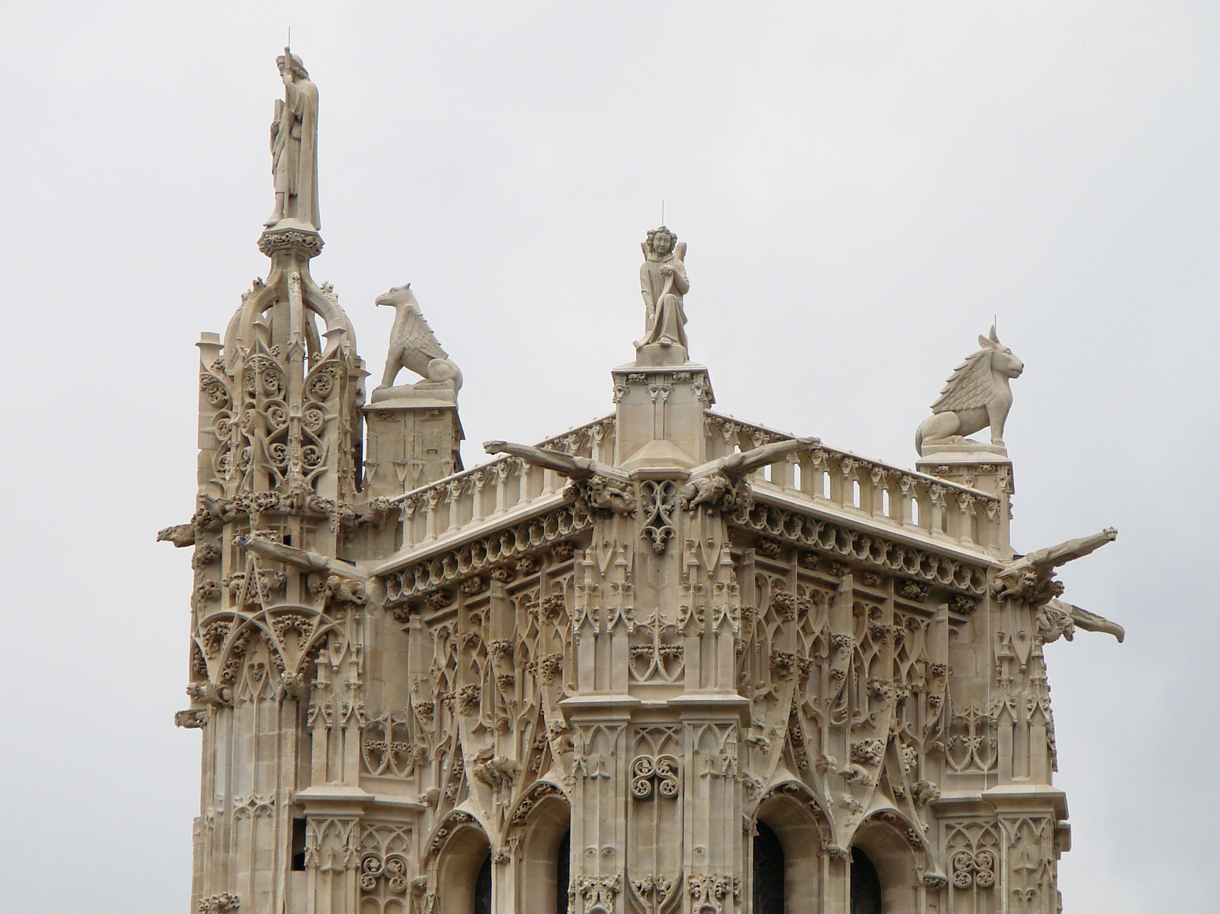 La Tour Saint-Jacques à Paris après restauration.